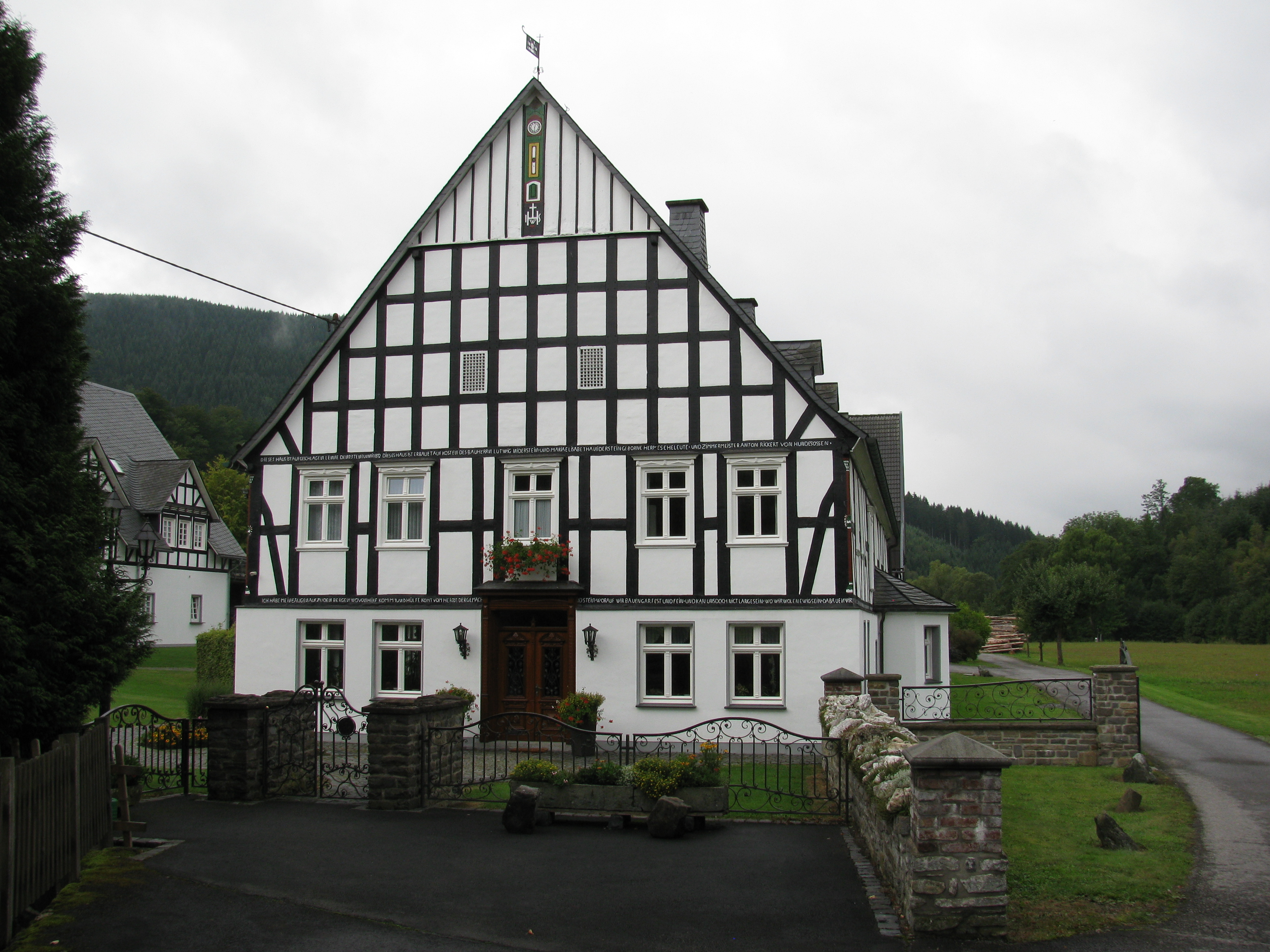 das Haus Nierstenhof 1 in Schmallenberg-Lenne